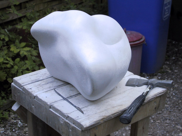 « das nasobem (sehr frei nach h.c.morgenstern) », Marmor, ca. 35x55x45 cm / 59 kg